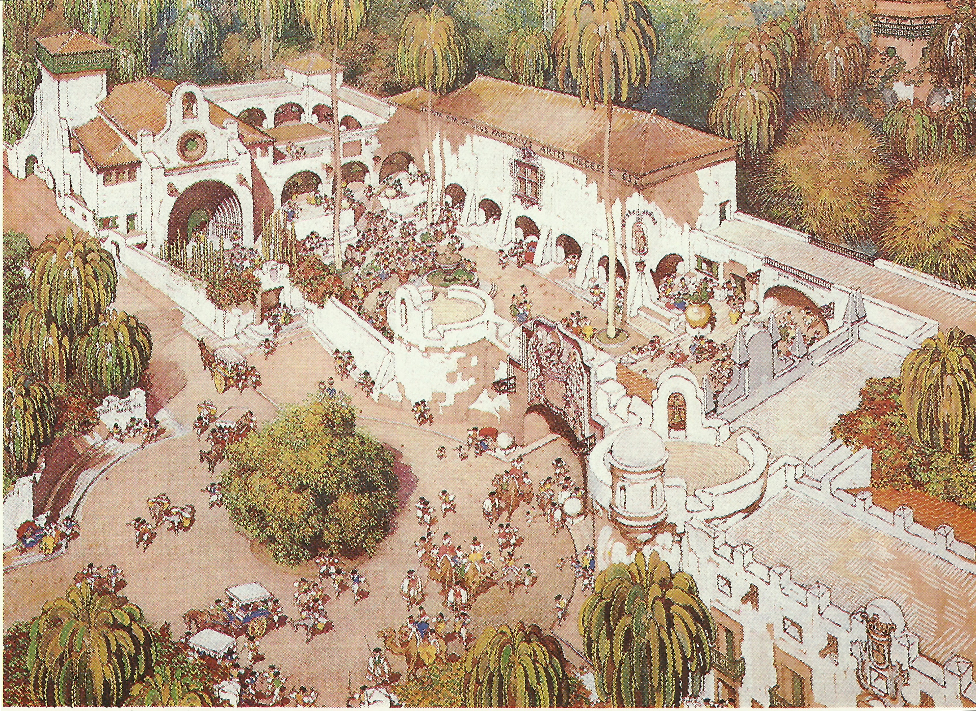 22. El Pueblo Canario, 1937, acuarela (Museo Néstor).